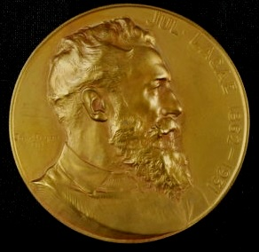 Le sculpteur Jules Lagae (1862-1931) sur une médaille taillé par Josuë Dupon, frappée en 1916.